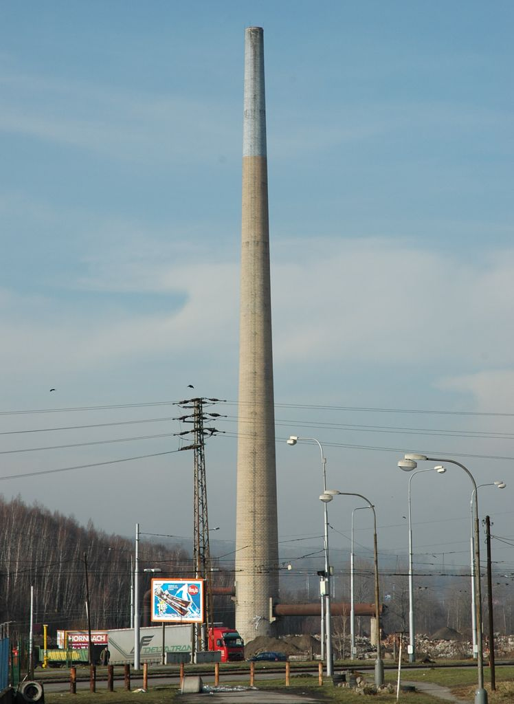 Komín bývalých Hrušovských chemických závodů, Ostrava